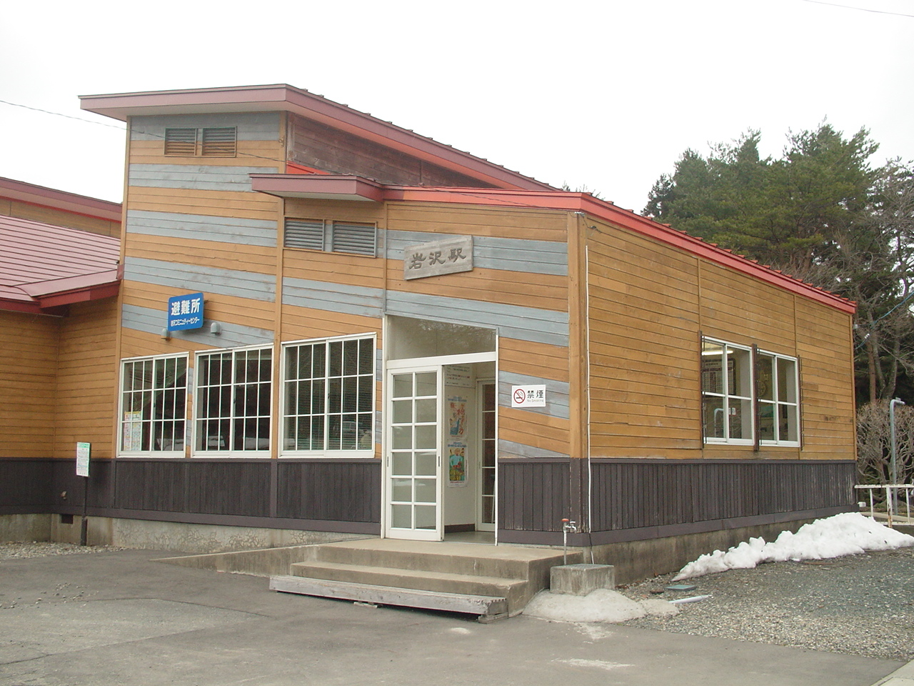 （岩沢駅）